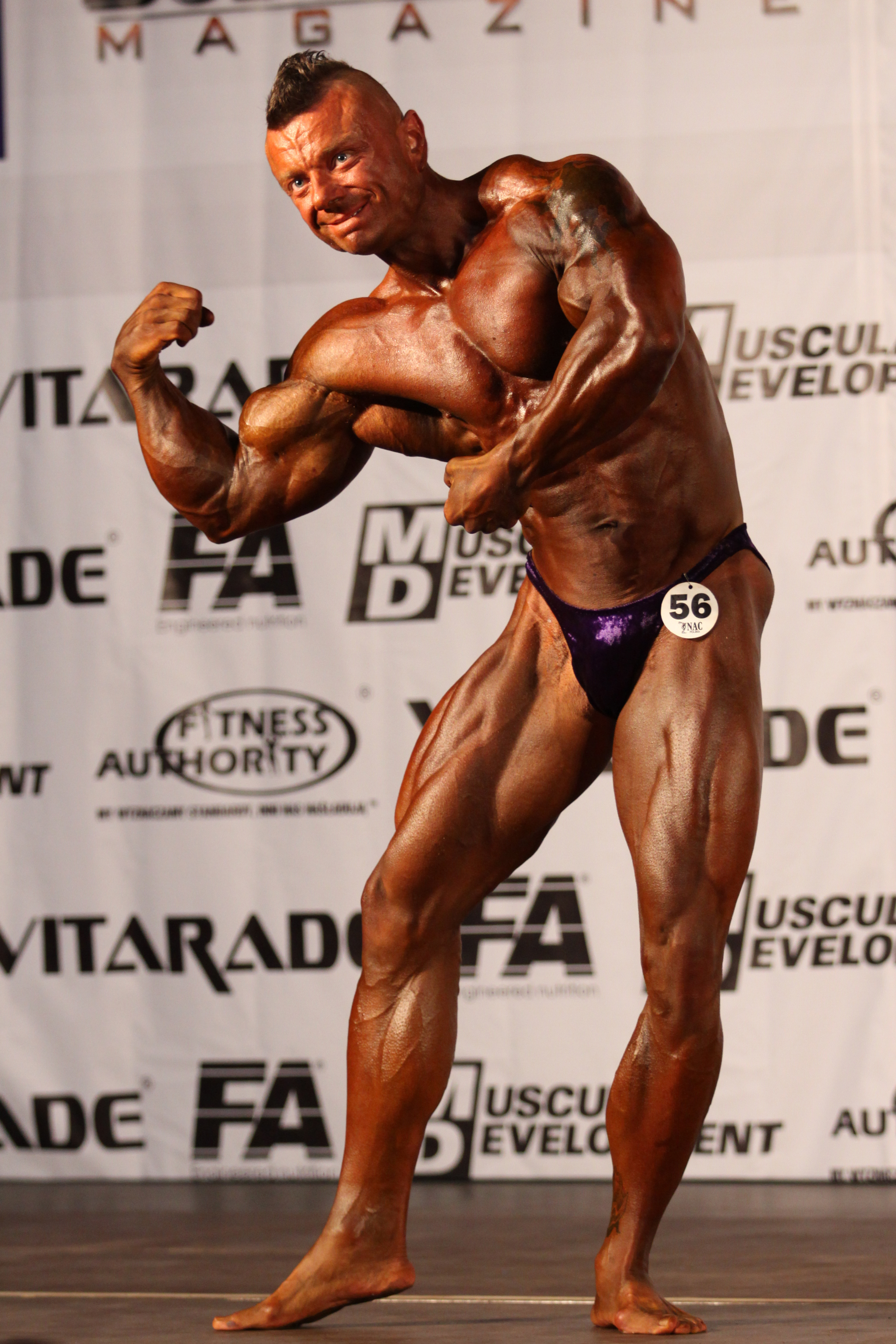 MP Świecie